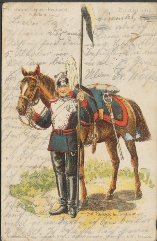 Potsdamer Garde-Ulan